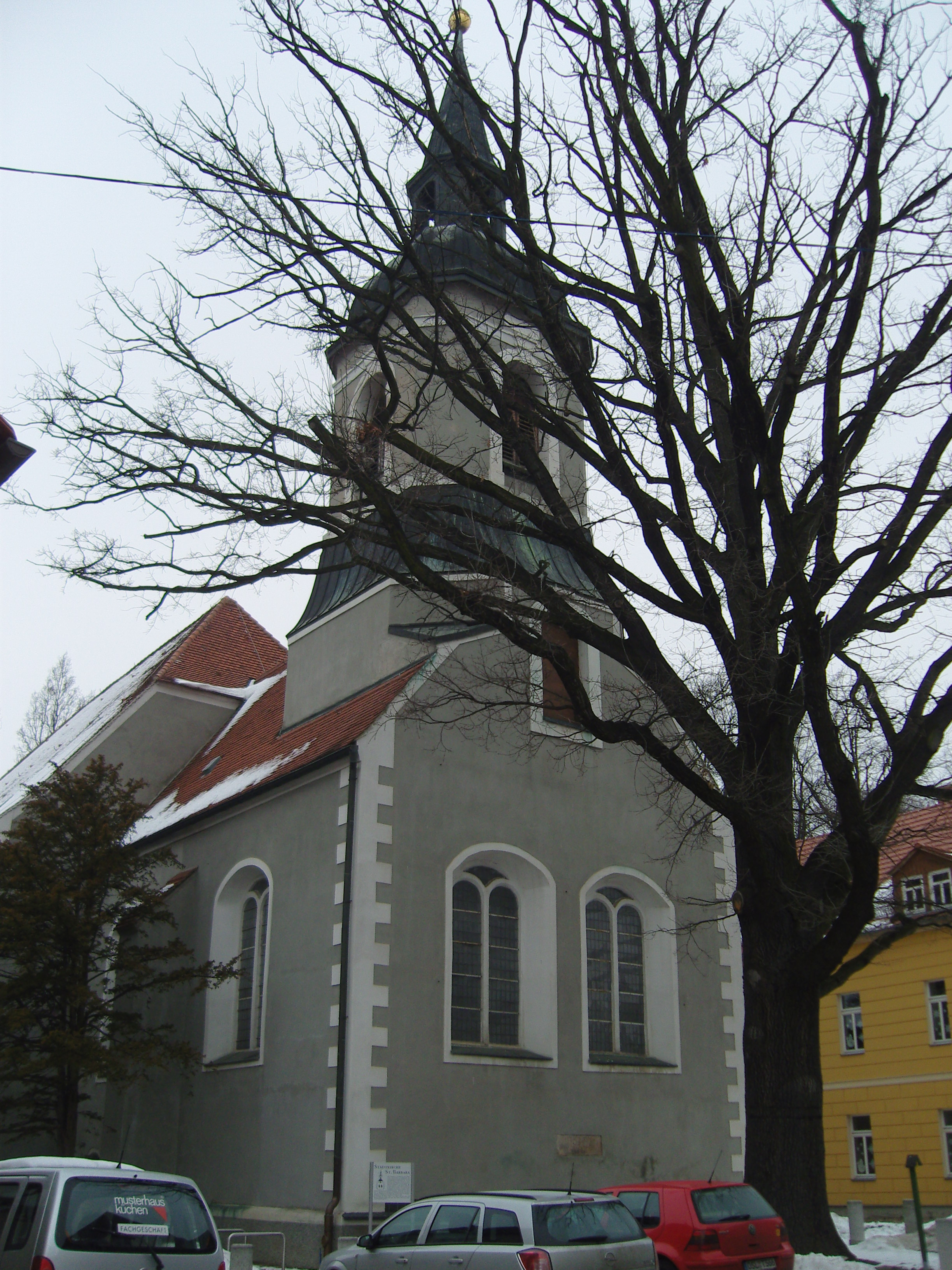 St-Barbara-Kirche in Ortrand, Baudenkmal